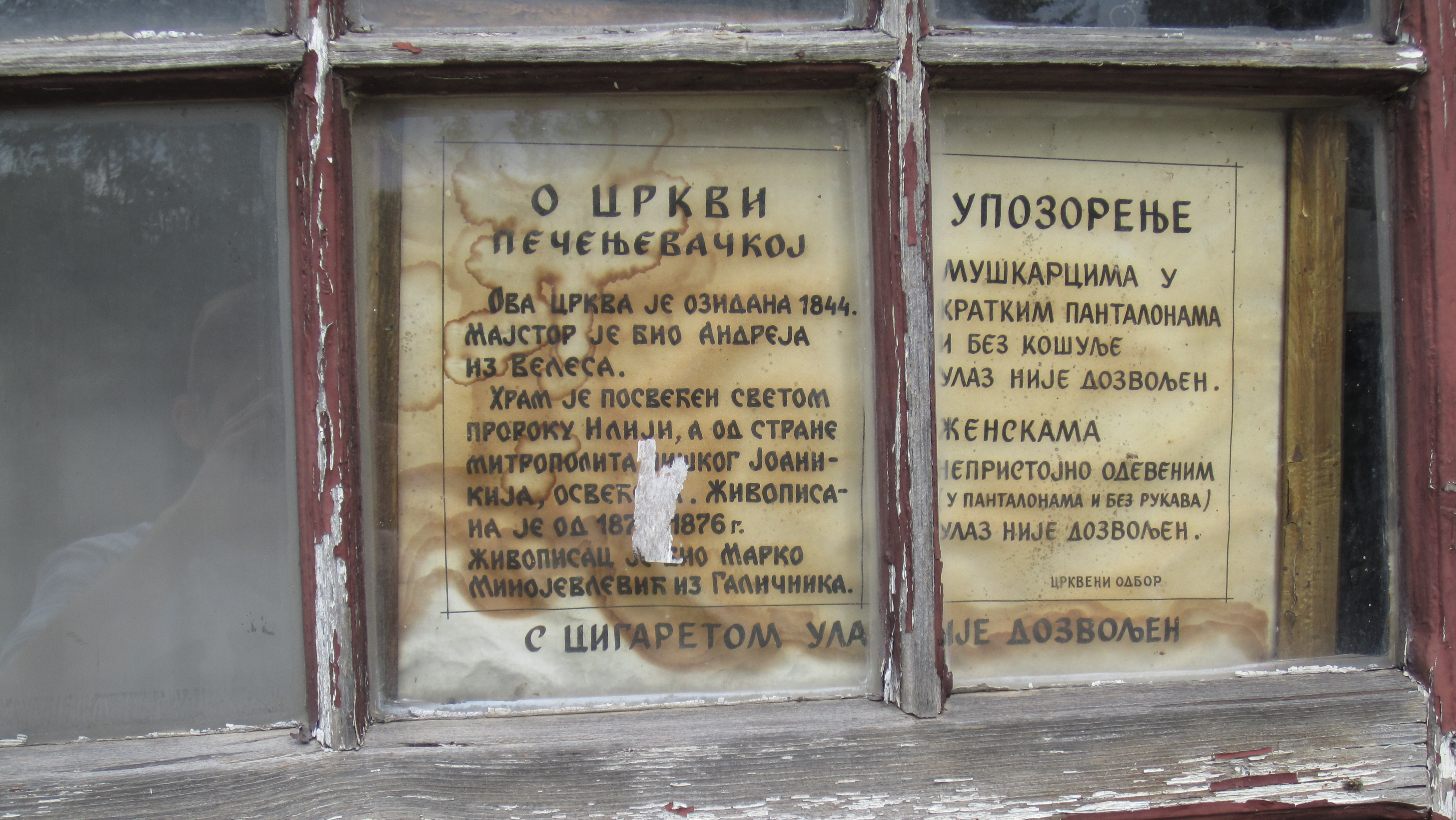 Srpski (latinica): Pečenjevce, Leskovac